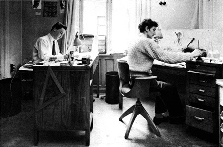 Nils Egerbrandt och Rolf Gohs delade rum på Press & Publicity 1951–1952. Fotot förekommer i Armas Morby 50 år (1959), Armas Morbys arkiv, Riksarkivet i Stockholm och återfinns i Svensk Seriehistoria: andra boken från Svenskt Seriearkiv (Malmö 2016) s. 33.